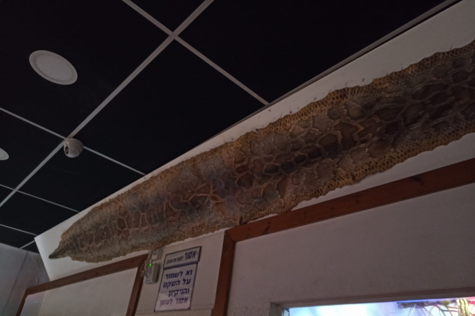 גן החי